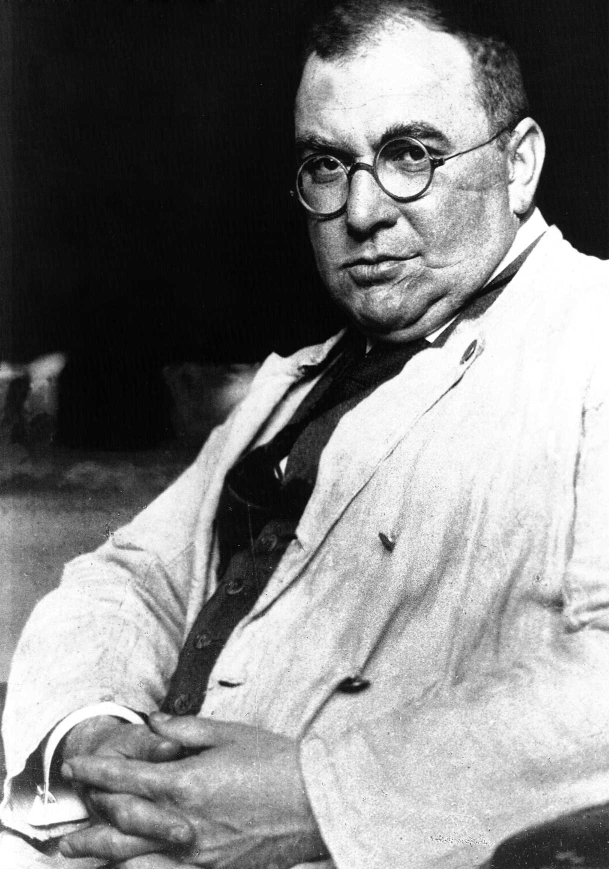 Hans Erlwein (1872-1914), German architect